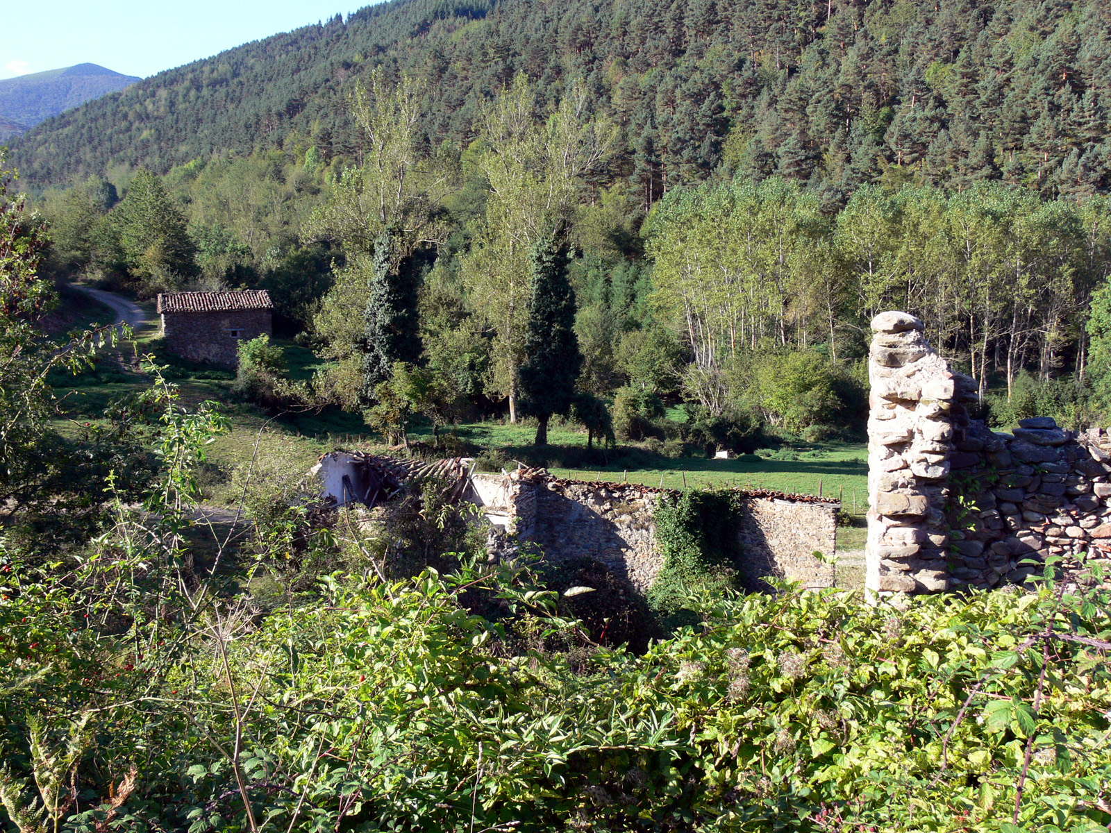 Villanueva, despoblado de Pazuengos (La Rioja - España)